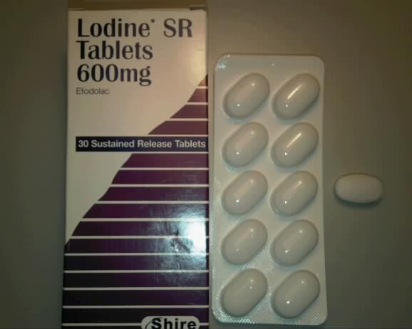 Etodolac (Lodine SR) 600mg